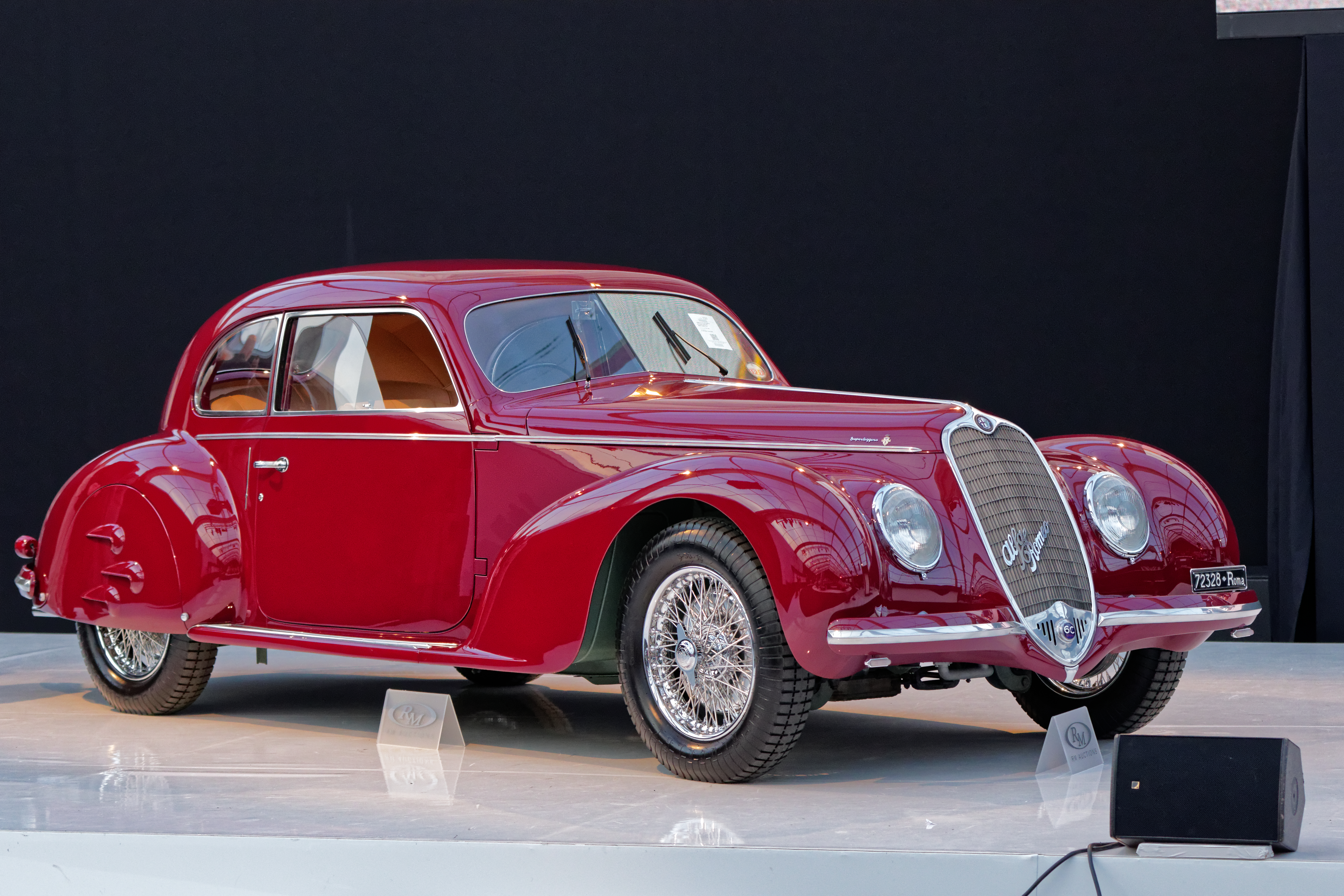 La vente aux enchères RM auctions aux pied des Invalides à Paris le 4 février 2015.